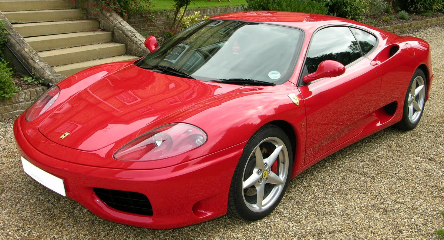 Ferrari F360 Modena